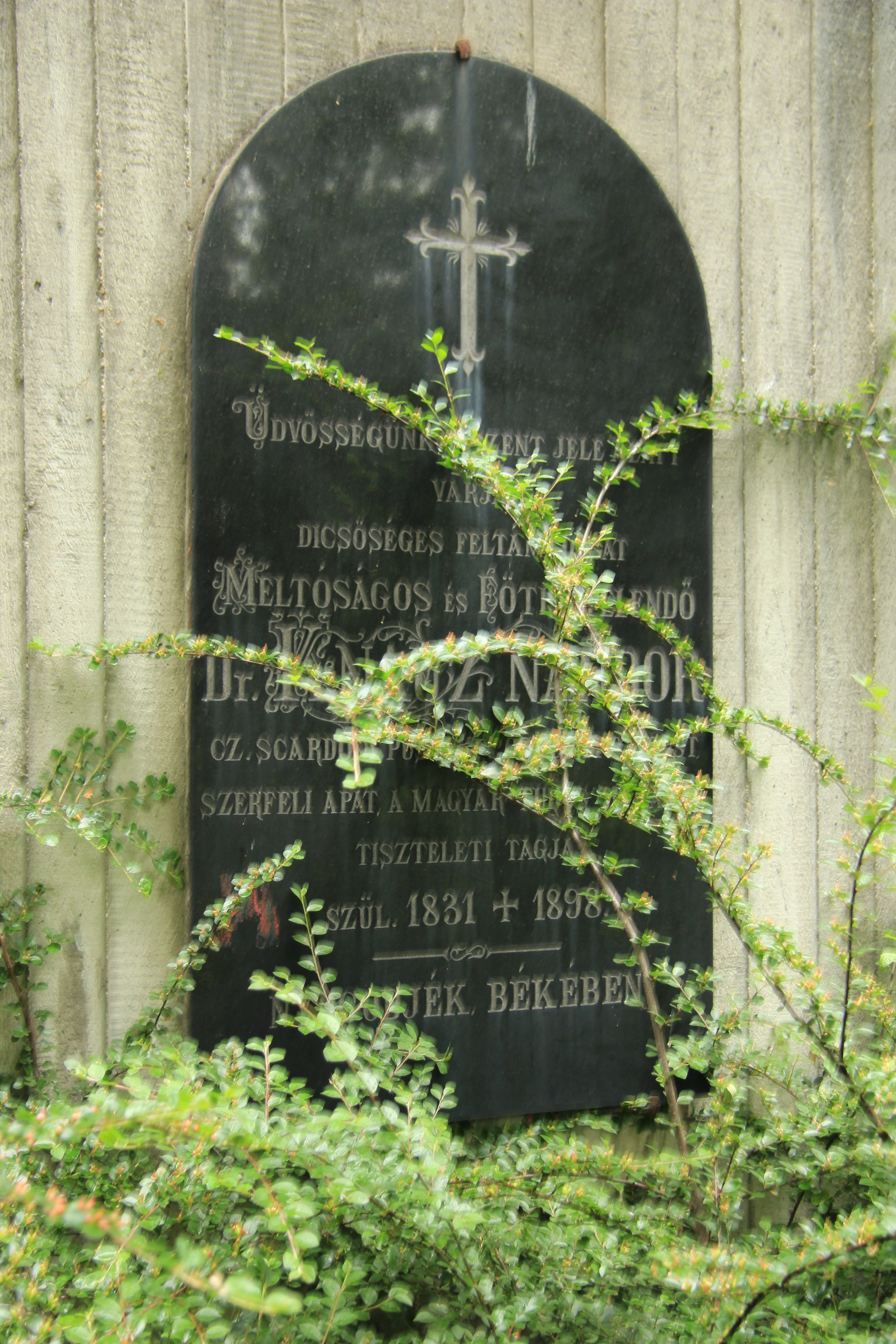 hrob s mrežovou ohradou+kameň, kov; Knauz Ferdinand